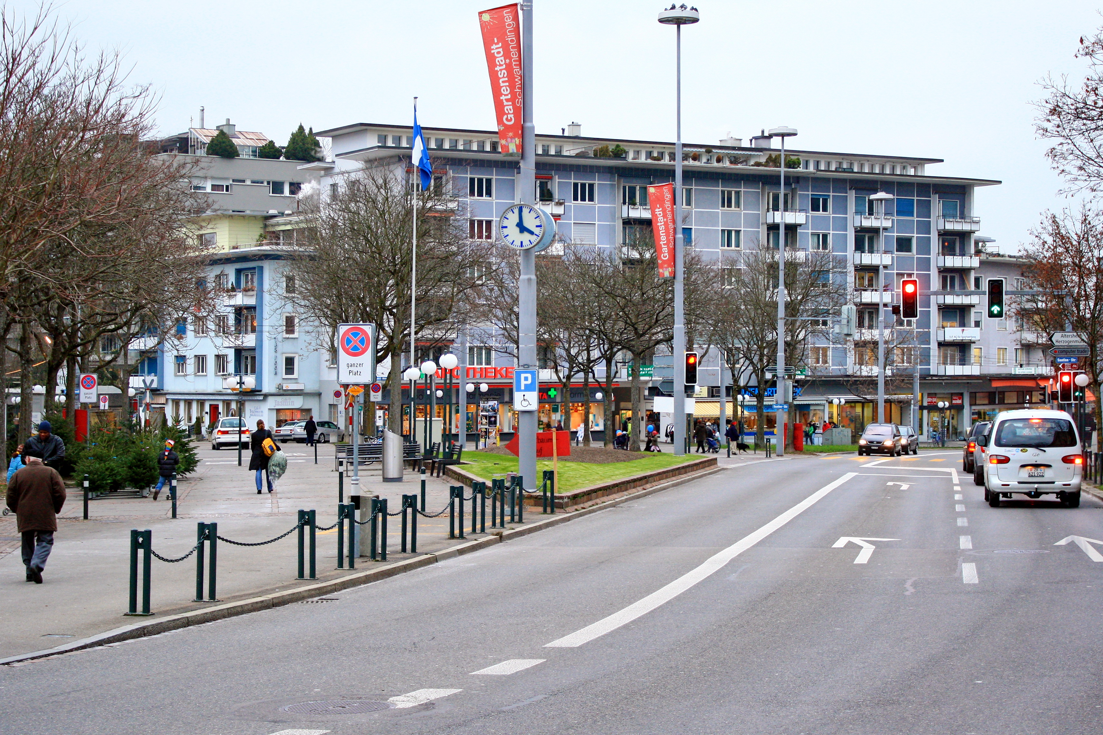 Winterthurerstrasse in Zürich-Schwamendingen (Switzerland), Schwamendingerplatz in the background.